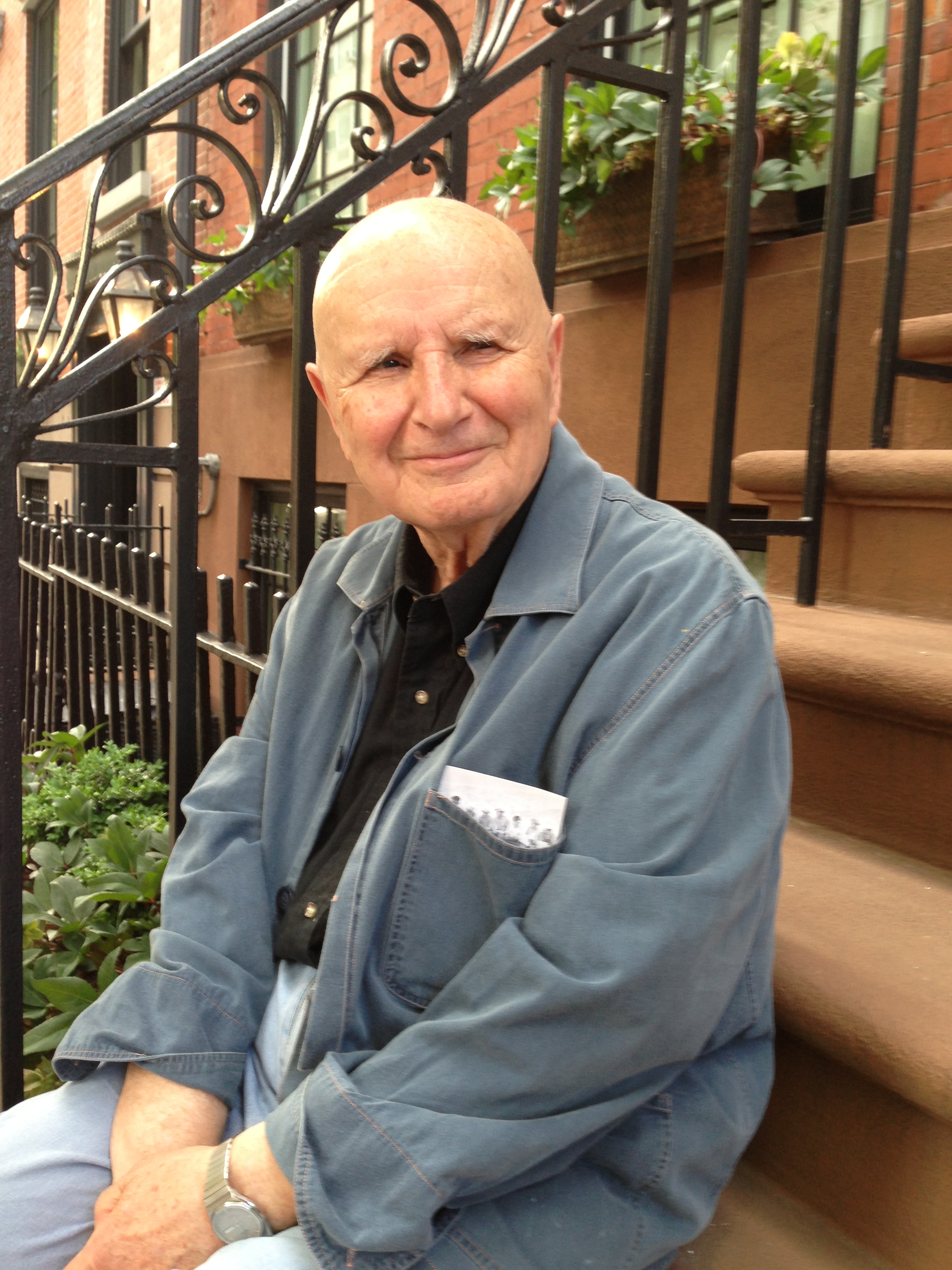 Salah Stétié New York mai 2013